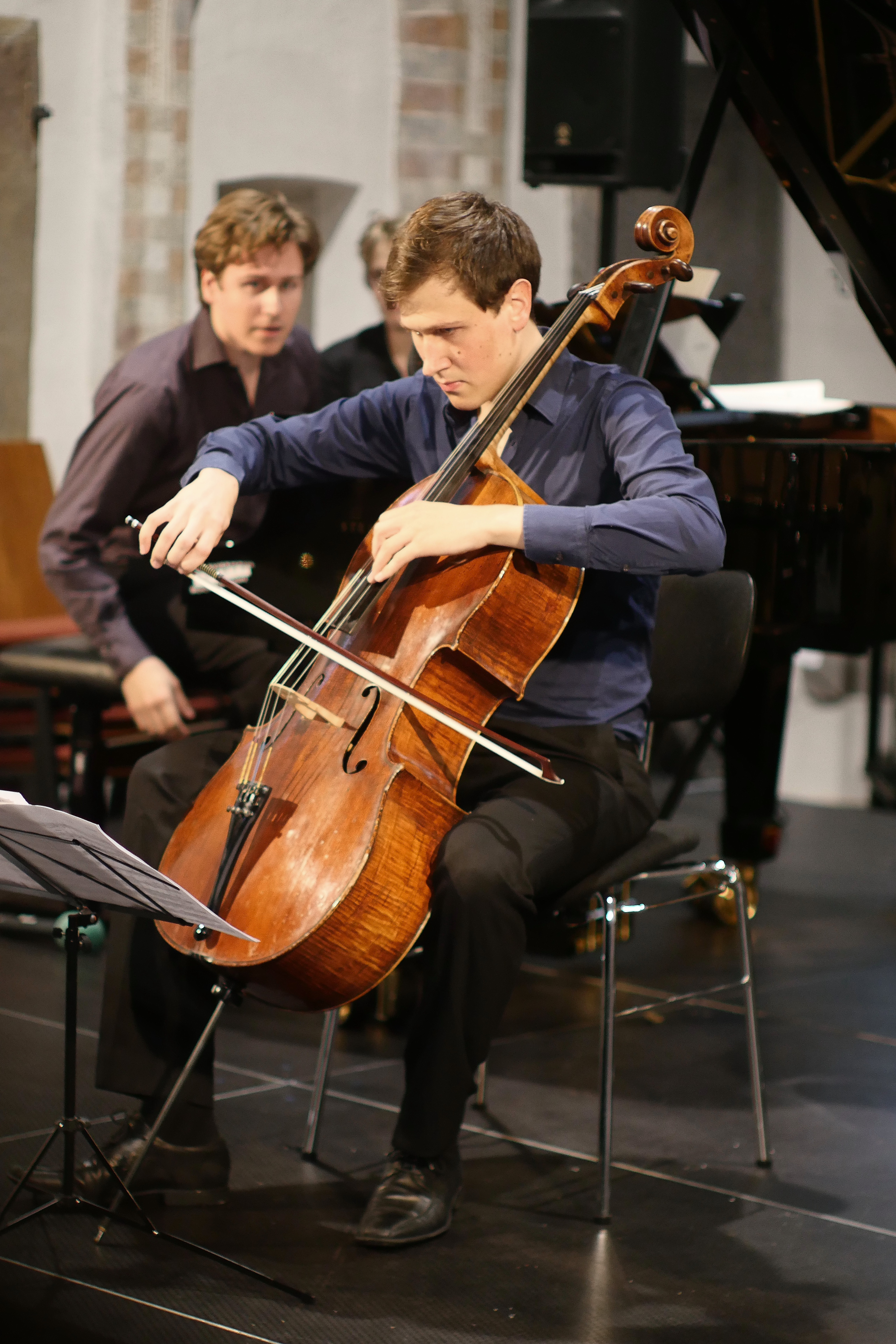 Wassily Gerassimez beim Gezeitenkonzert